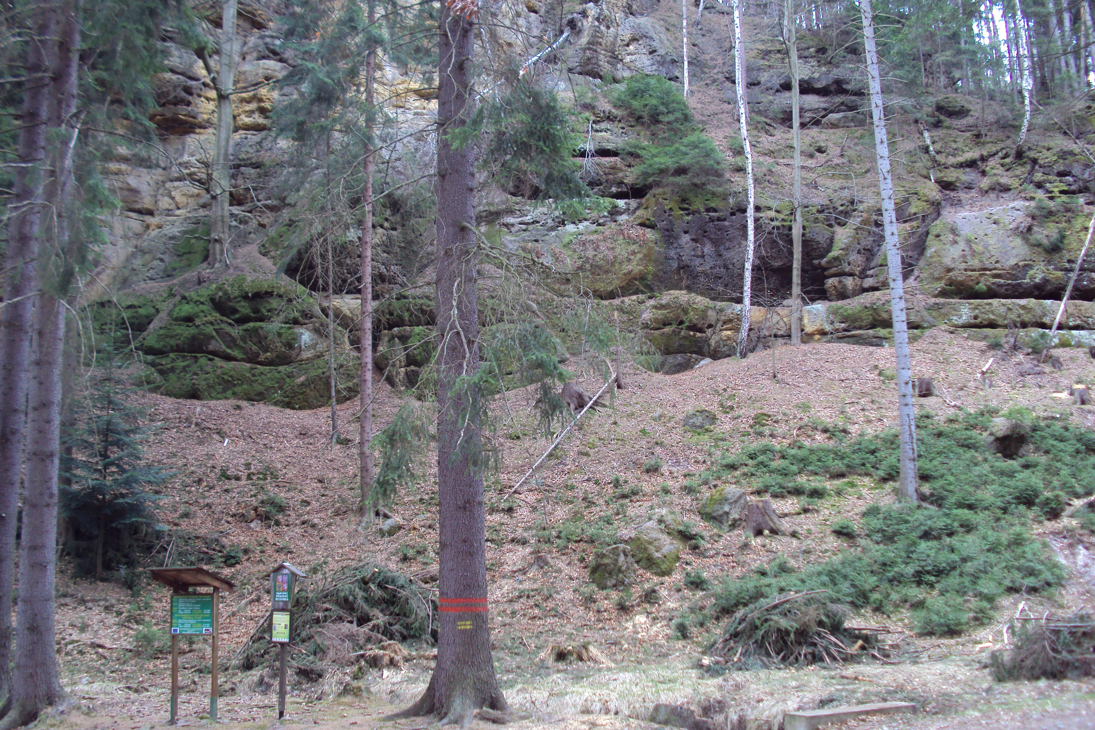 Národní přírodní rezervace Břehyně Pecopala, na zelené od Hradčan do Starých Splavů, katastr obce Doksy